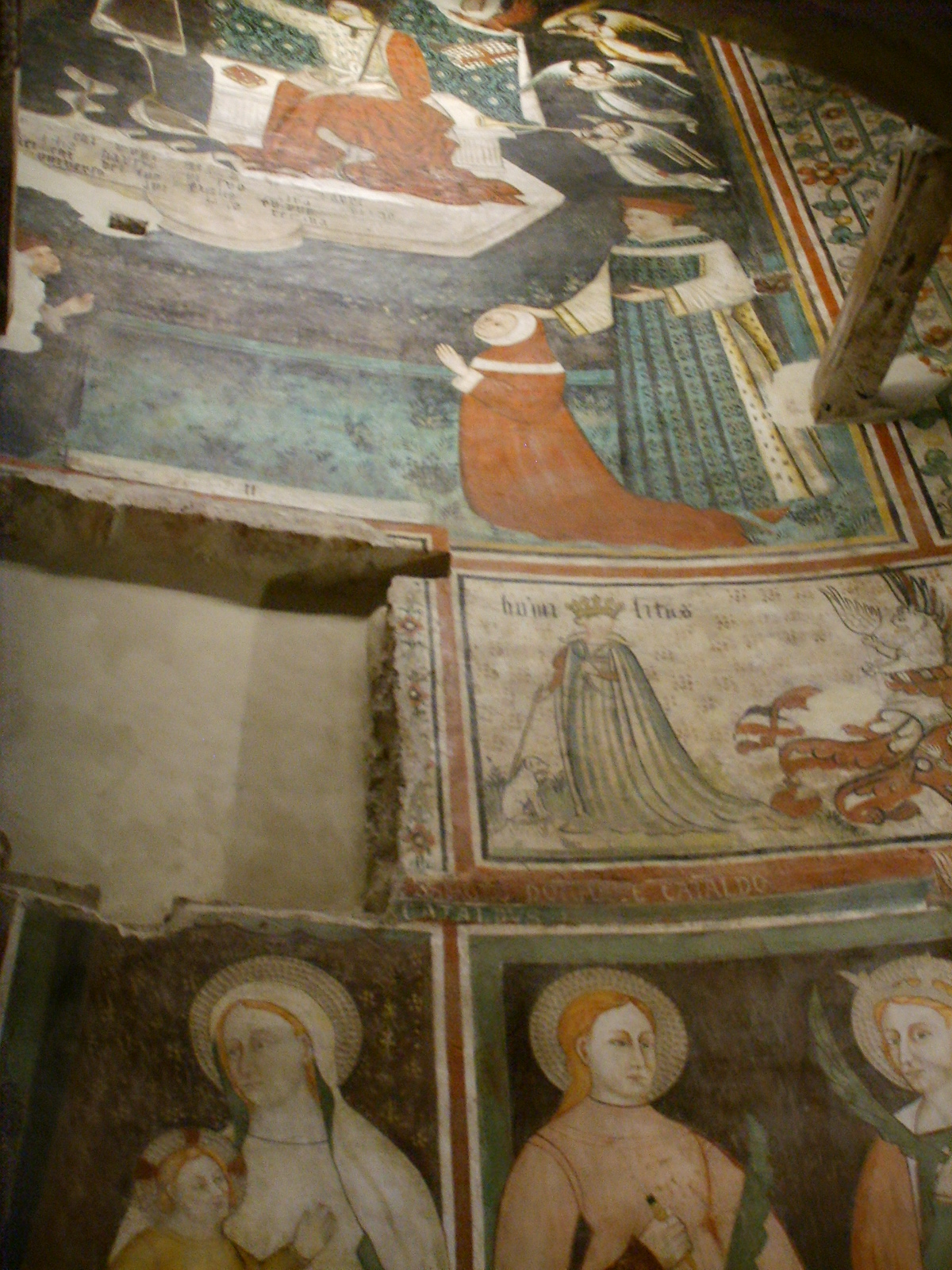 Cremona, duomo, interno